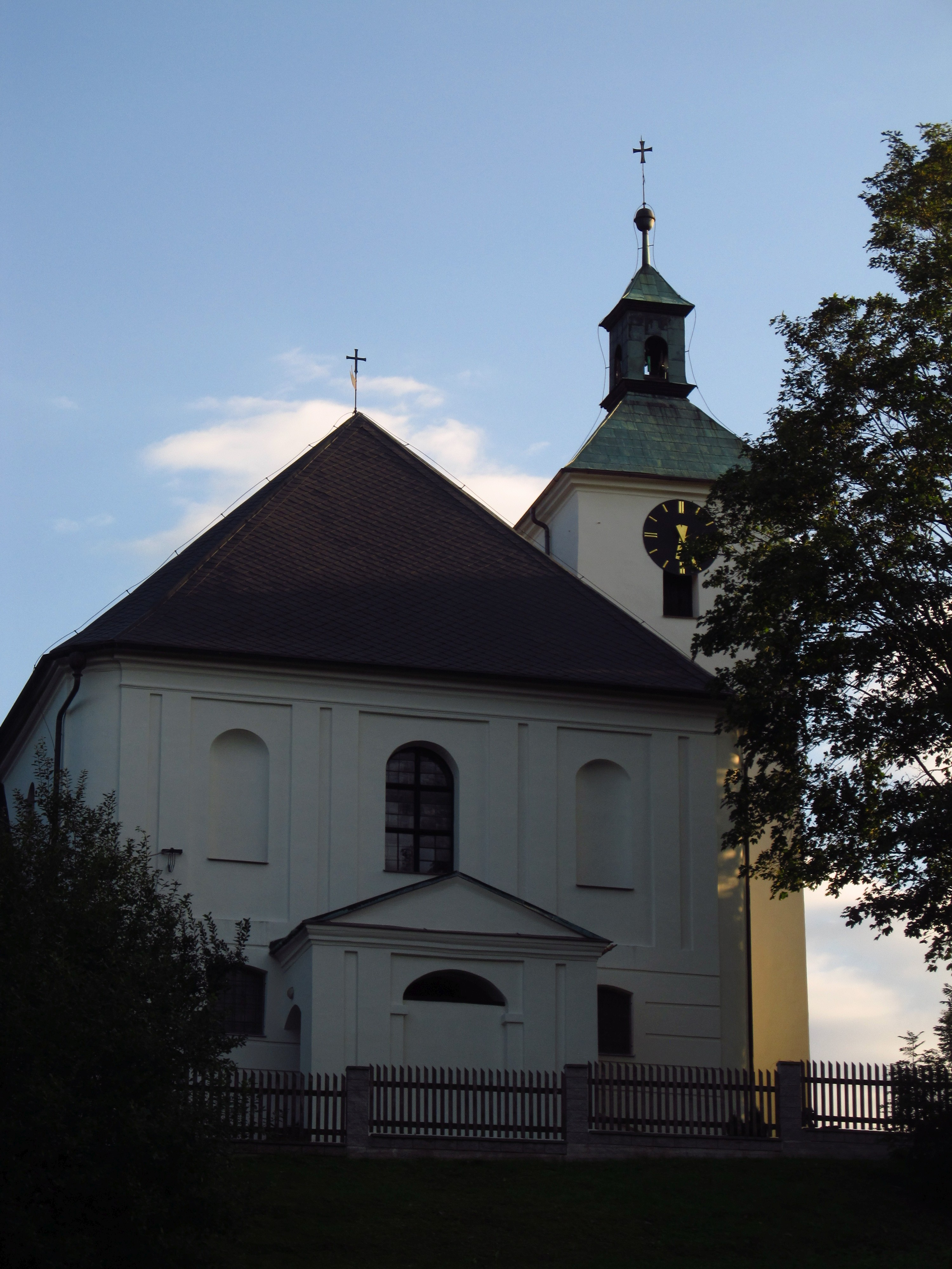 Kostel svatého Jakuba Staršího, Dolní Moravice.